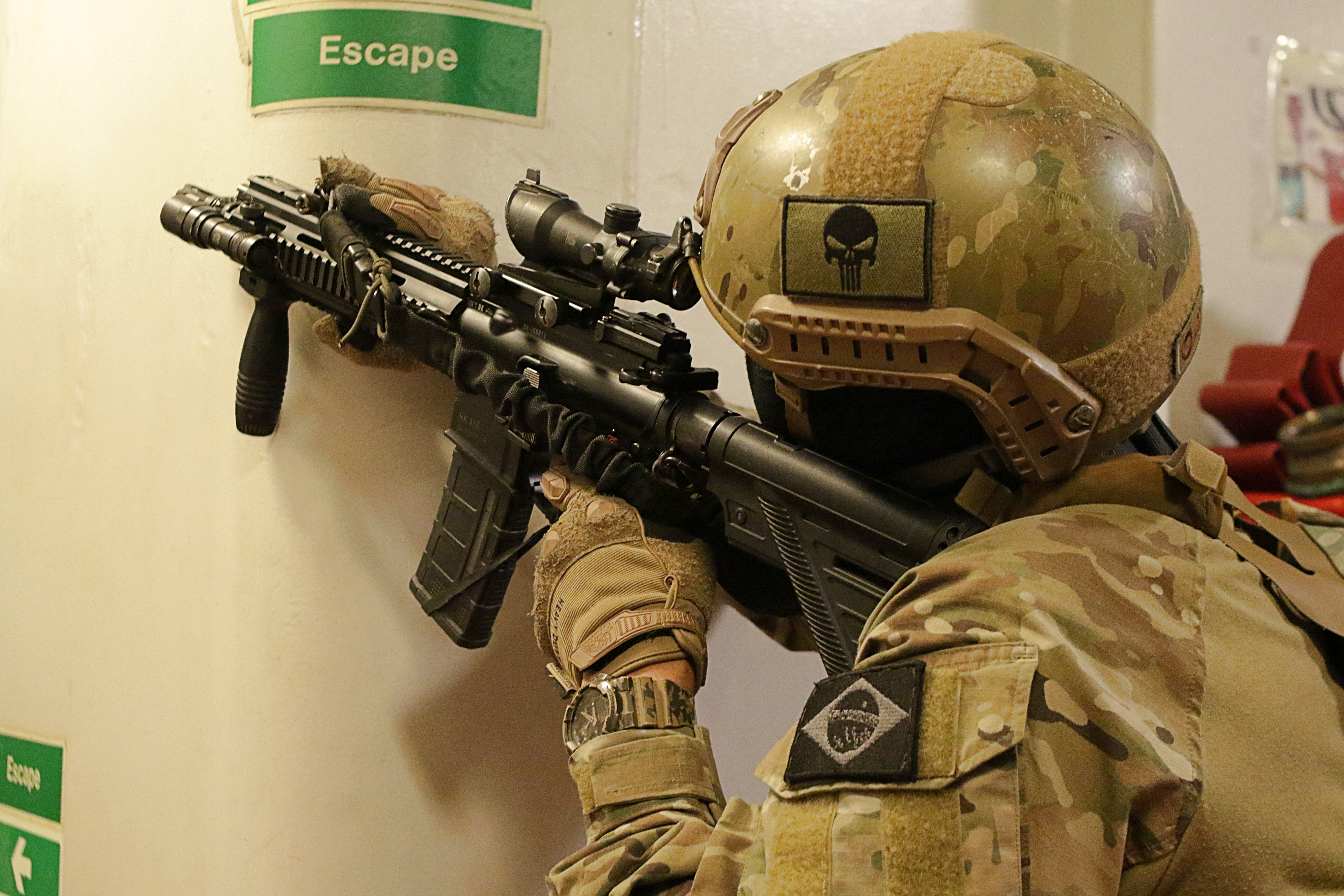 Arquivo liberado pela Marinha do Brasil através de parceria de conteúdo com Wiki Educação Brasil